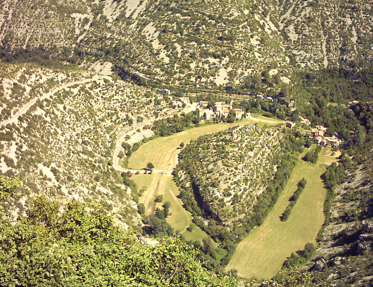 Le Cirque de Navacelle (Hérault)